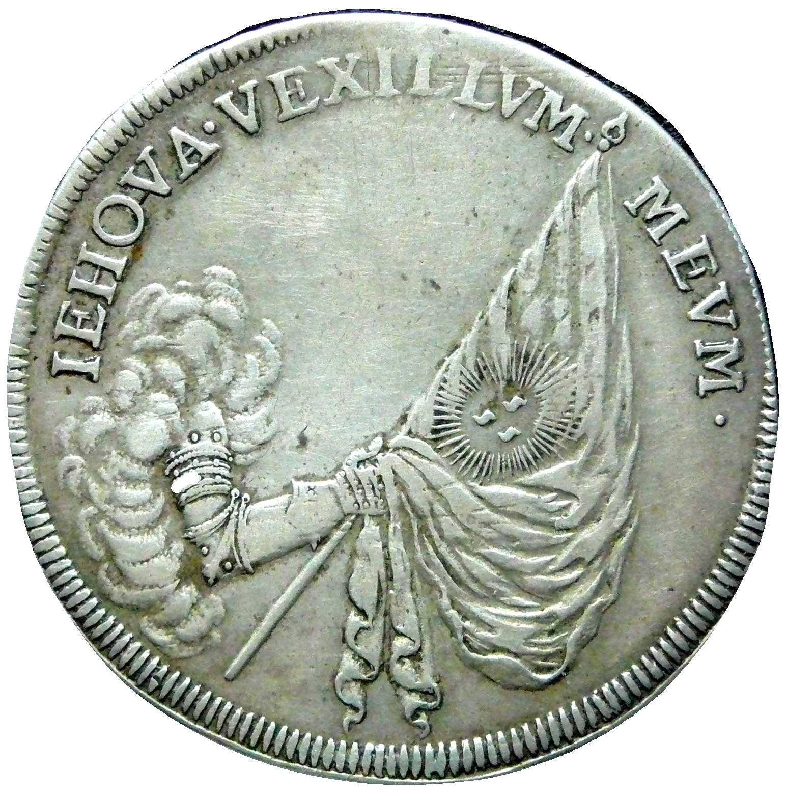 Kuranttaler 1691 Gedenkmünze Auf seinen Tod Johann Georg III. Herzog von Sachsen und Kurfürst Münzstätte Dresden, Münzmeister Johann Koch im Amt 1688 bis 1698 Prägung im 12-Taler-Münzfuß – Leipziger Münzfuß Ag 12 Loth = 750‰ Au Feingewicht: 19,488 g Gewicht: 25,84 g Durchmesser: 43,79-45,80 mm Dicke: 1,95 mm Ein aus den Wolken ragender geharnischter Arm, eine Fahne haltend, darin der strahlende Name steht (Jehovah. Vexillum. Meum.) Umschrift oben durch Fahnenspitze getrennt: IEHOVA ◦ VEXILLVM ◦ MEVM ◦ (= Der Herr mein Panier.)